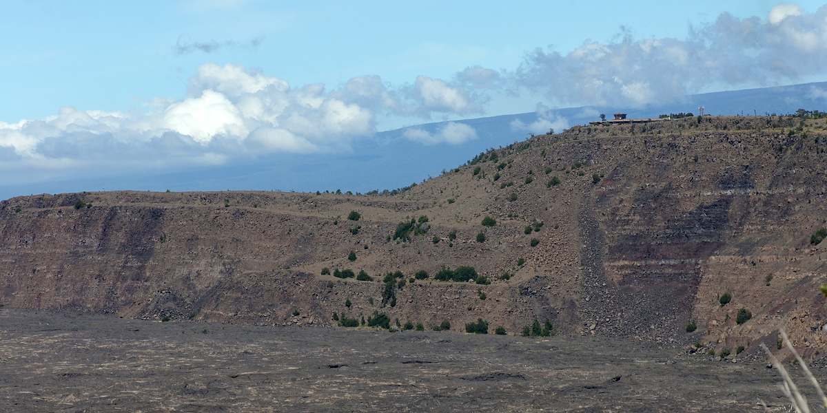 Иллюстрация для викиучебника Гавайеведение